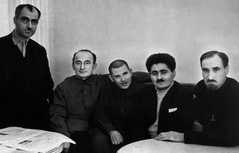 Лаврентий Берия и Николай Ежов среди делегатов XVII съезда ВКП(б) от Закавказских республик. Г. Москва